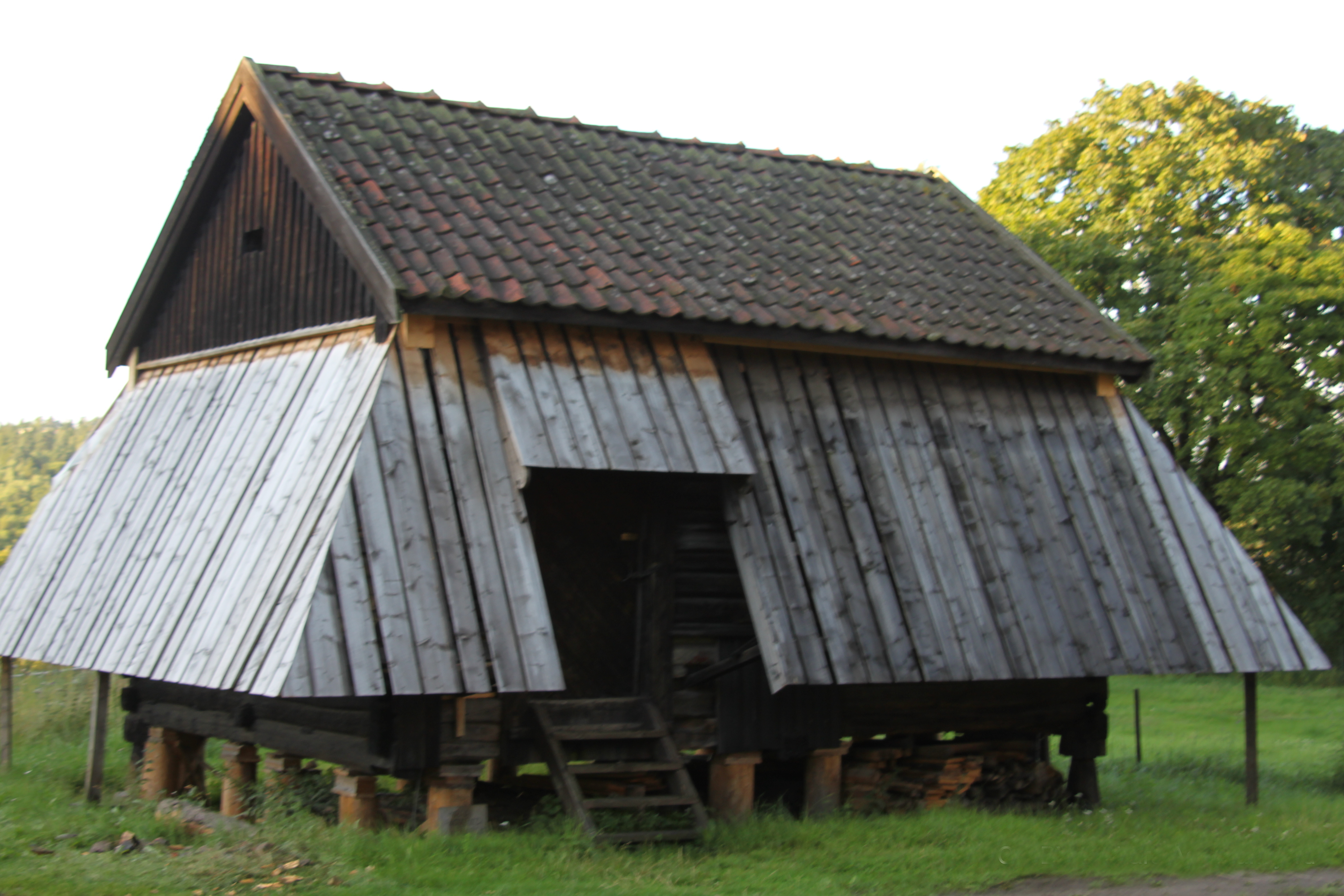 Kåpestabbur fra Fadum i Sem, nå på Slottsfjellsmuseet.